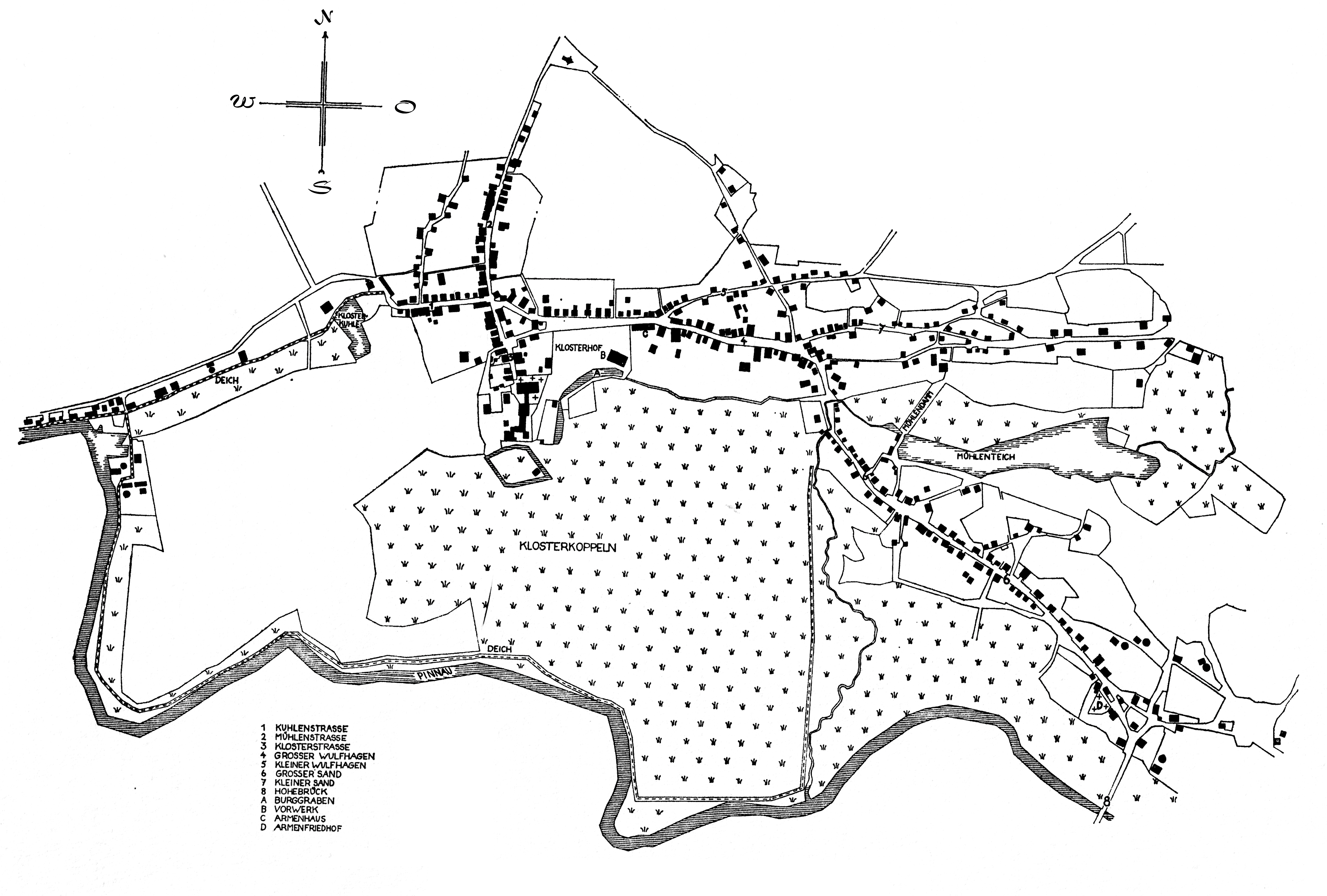 Uetersen nach dem Plan des damaligen Fleckens Uetersen und Umgebung aus dem Jahr 1786.